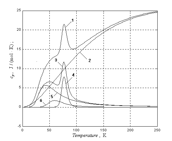 Аномальный пик на кривой теплоёмкости германия